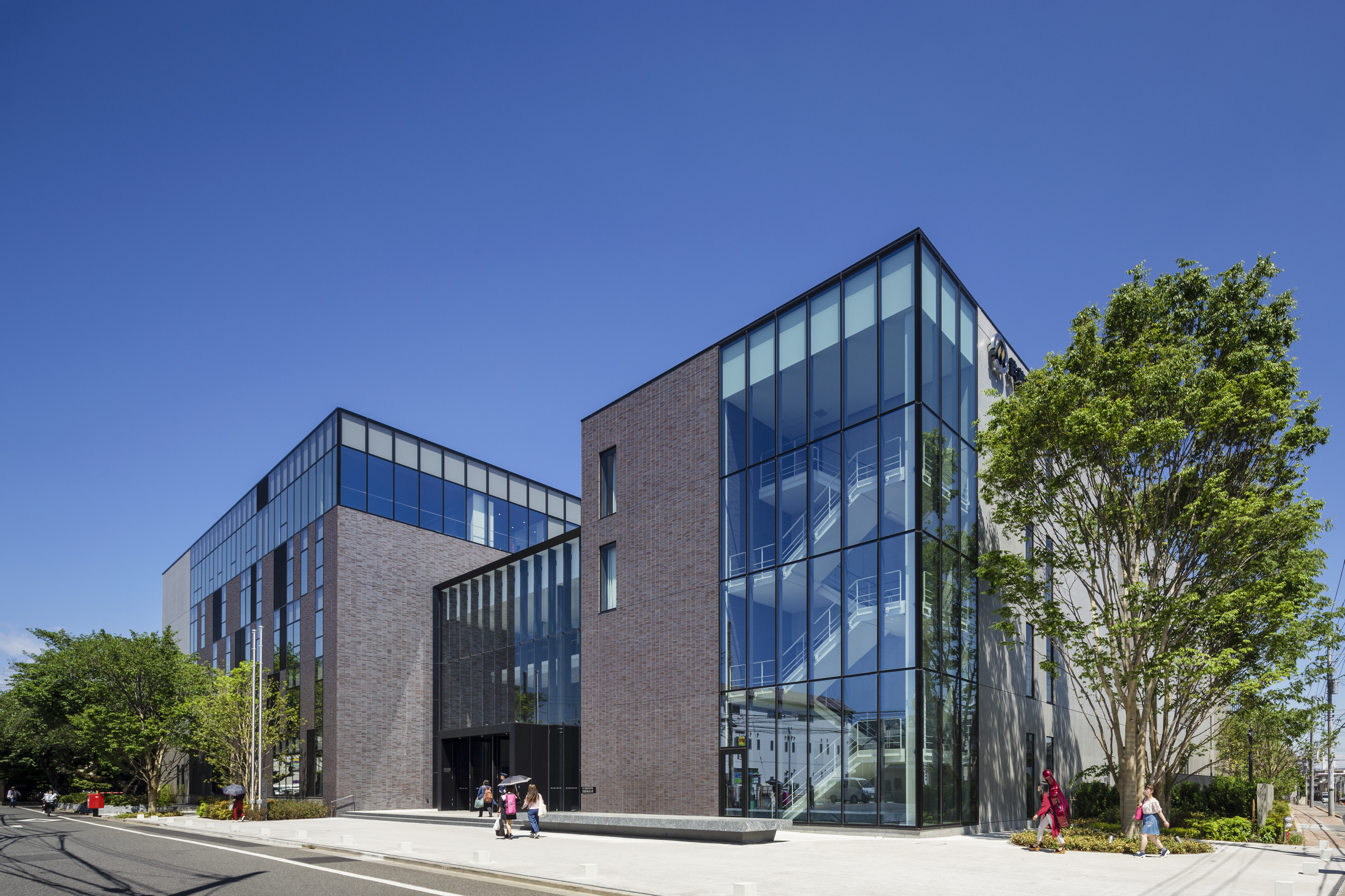 武蔵野音楽大学のキャンパスの外観です。